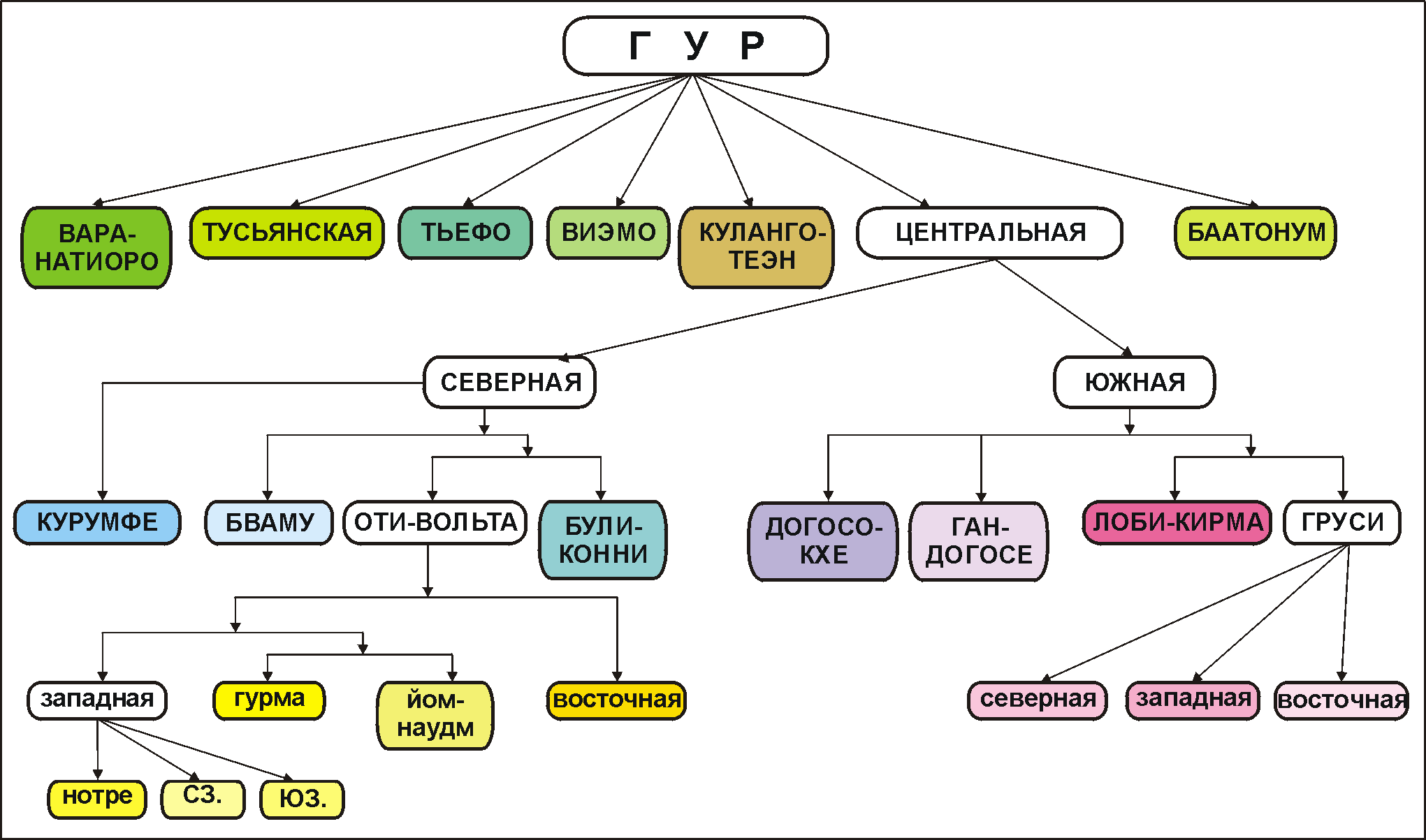 Classification chart of Gur languages Классификация языков гур. Сделана в основном на основе [Williamson, Blench 2000] с небольшими добавками из Ethnologue 2004. См. также карту языков гур.